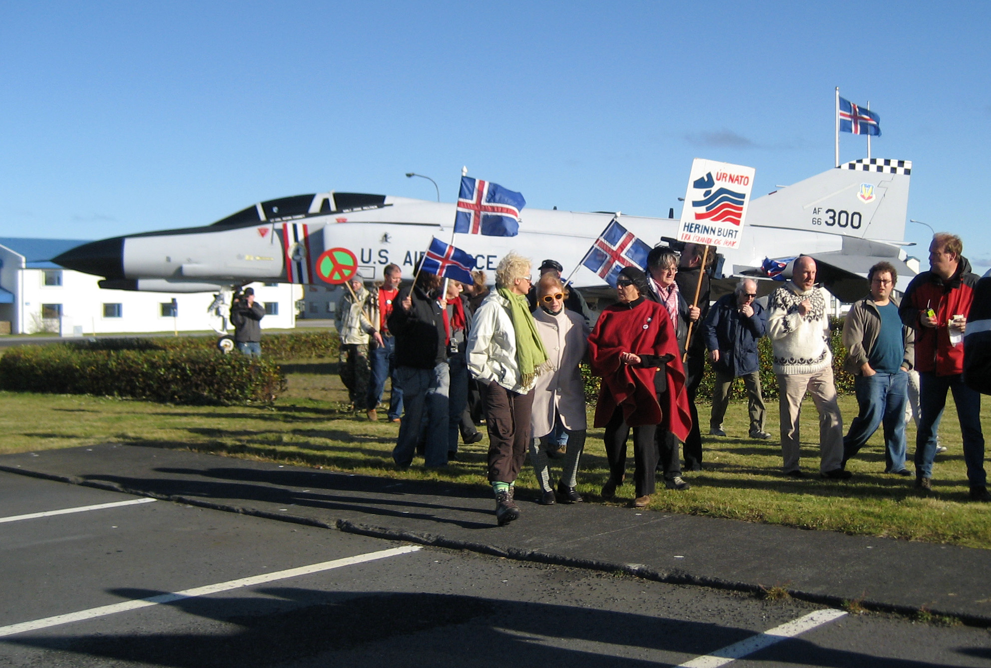 Herstöðvaandstæðingar fagna brottför bandaríska setuliðsins frá Íslandi með heimsókn í herstöðina á Miðnesheiði.